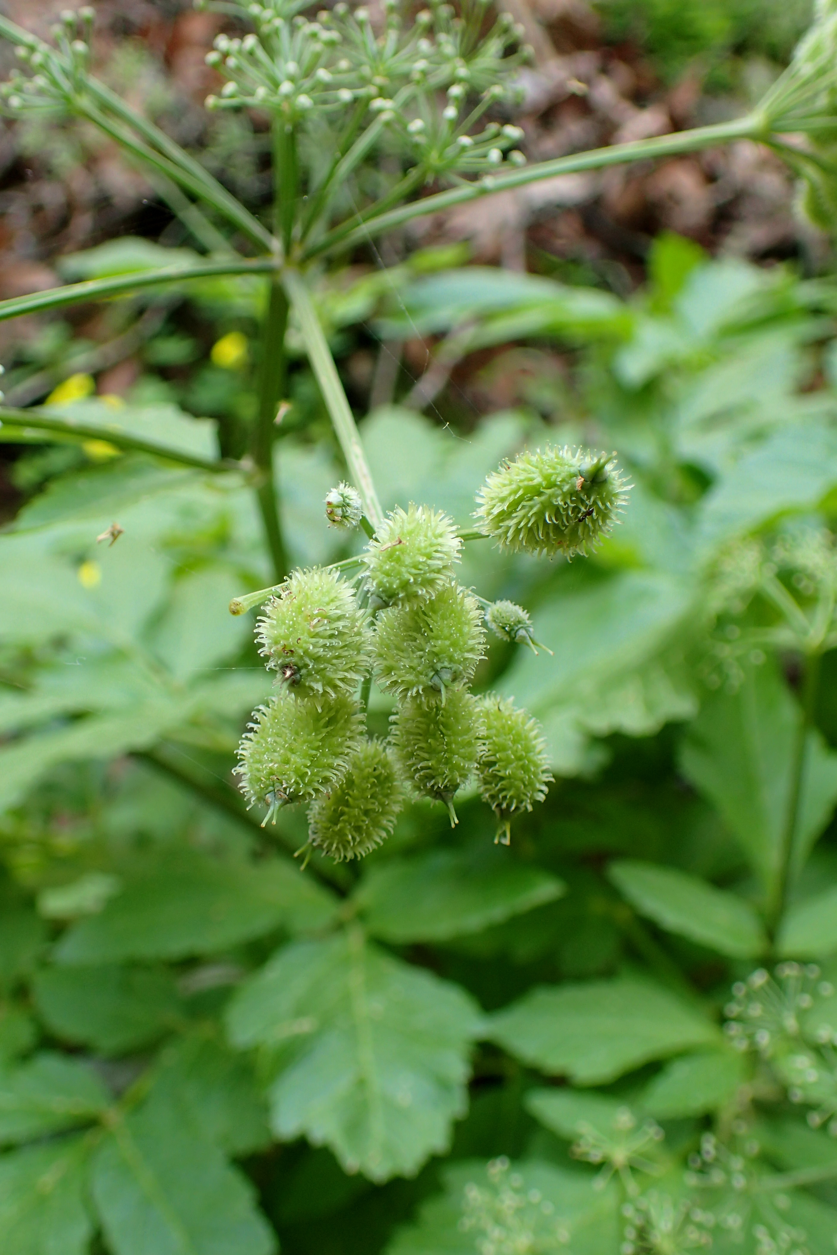 Lecokia cretica in Avakas Gorge, Cyprus